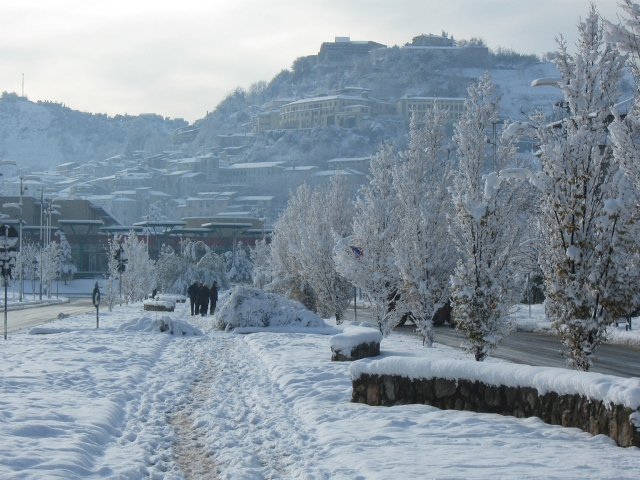 Viale Parco sotto la neve